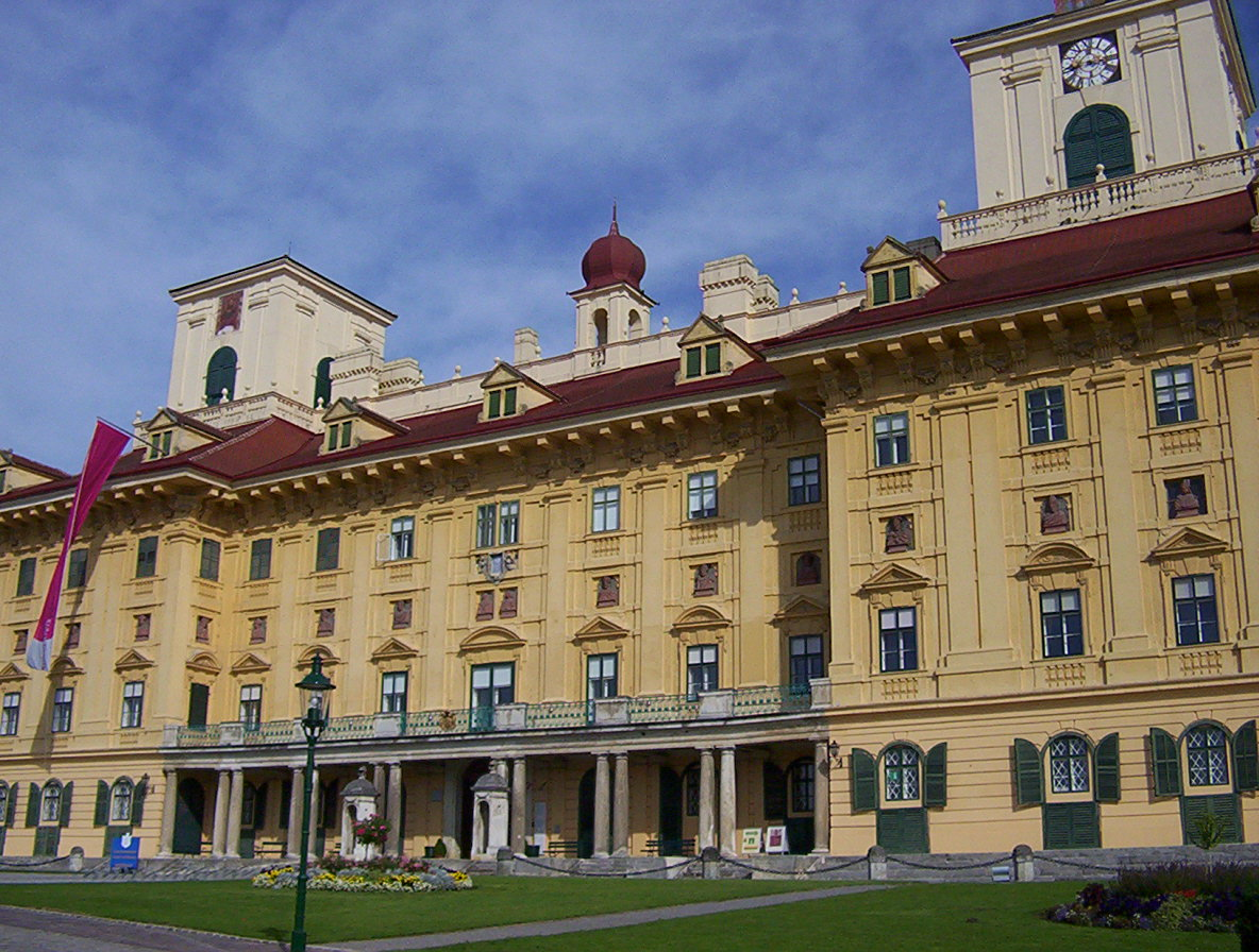 Eisenstadt, Austria